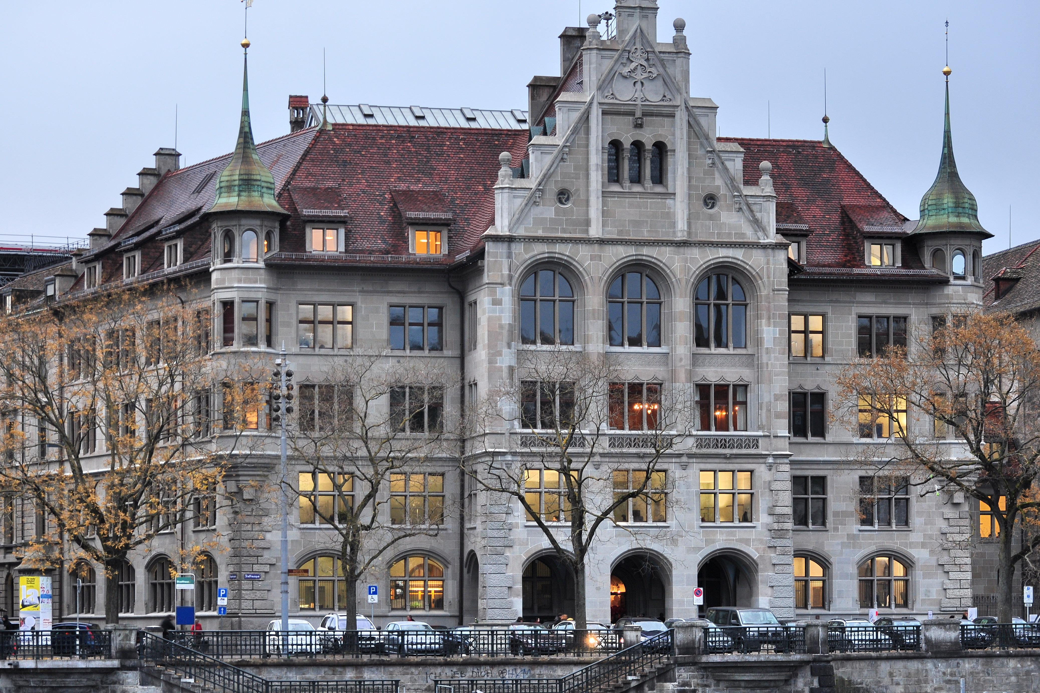 Stadthaus in Zürich (Switzerland) as seen from Limmatquai